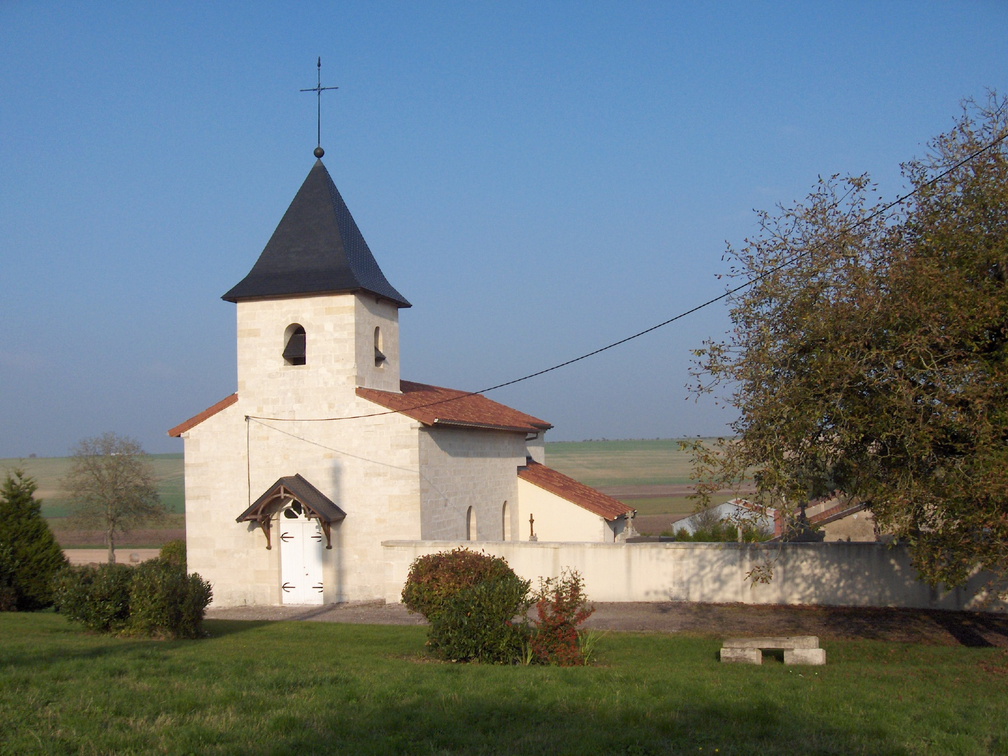 L'église de Gillaumé après rénovation